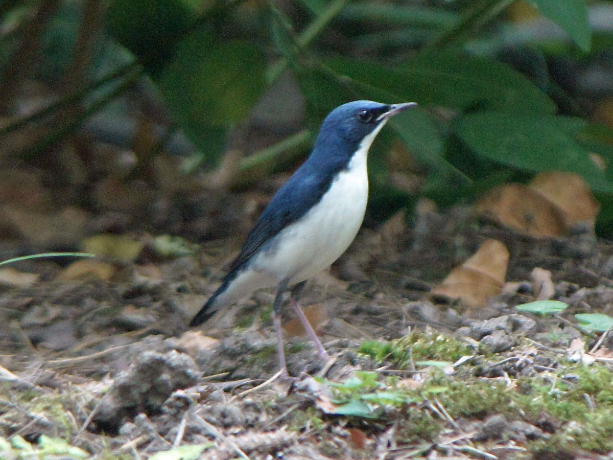 コルリ成鳥♂